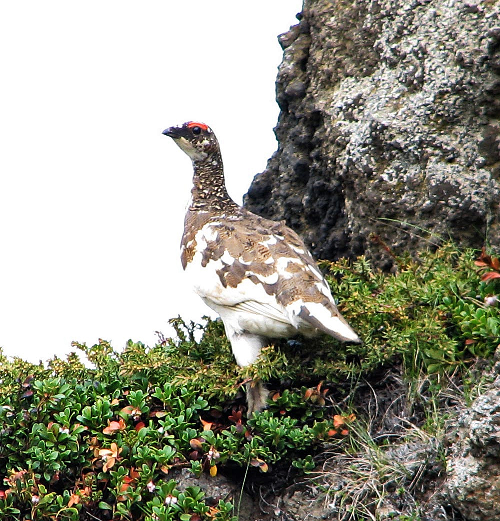 Lagopède alpin (Lagopus muta), Iceland